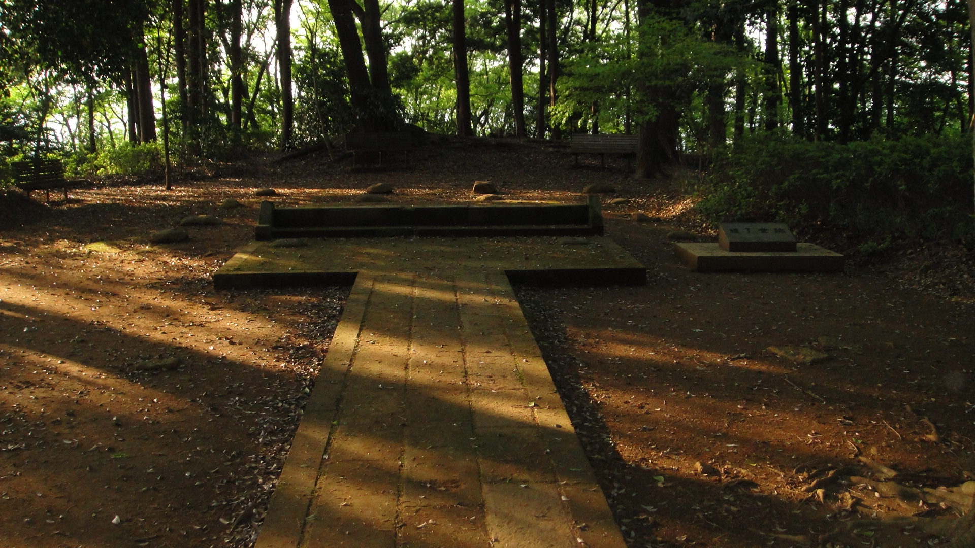 道了堂跡 妙覚道了 (大塚山公園, 東京都八王子市鑓水)